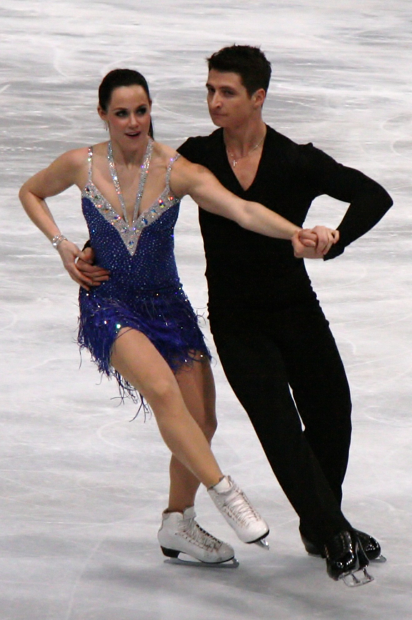 Тесса Виртью и Скотт Моир на 2011 Trophée Eric Bompard